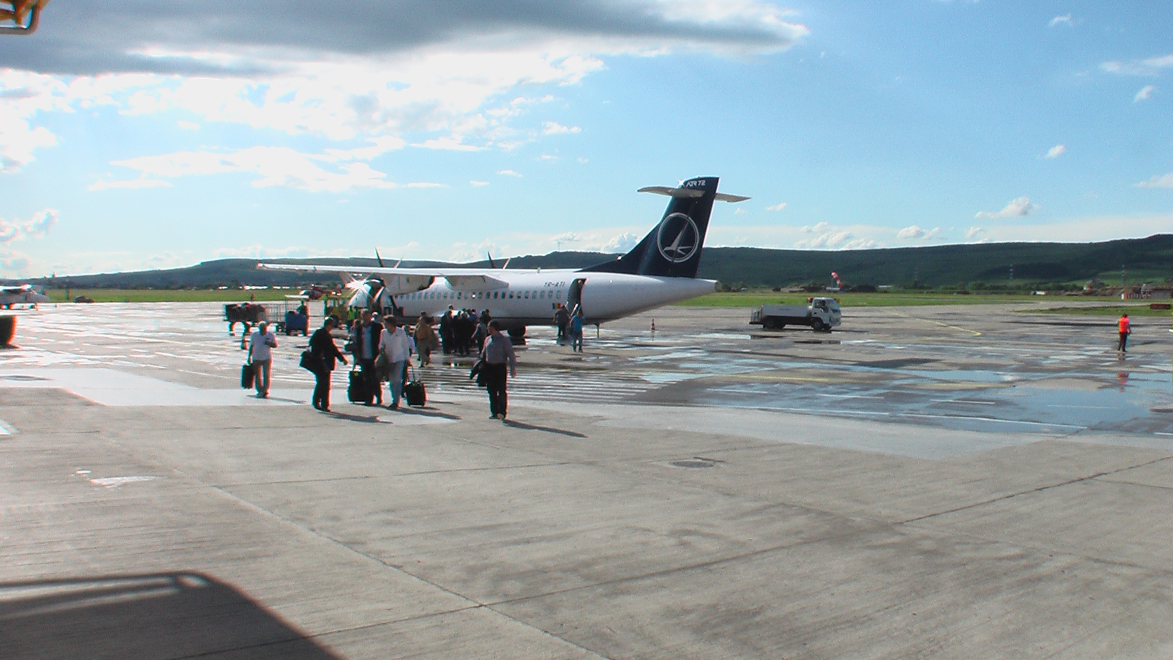 ClujNapocaFlughafenVorfeldTarom